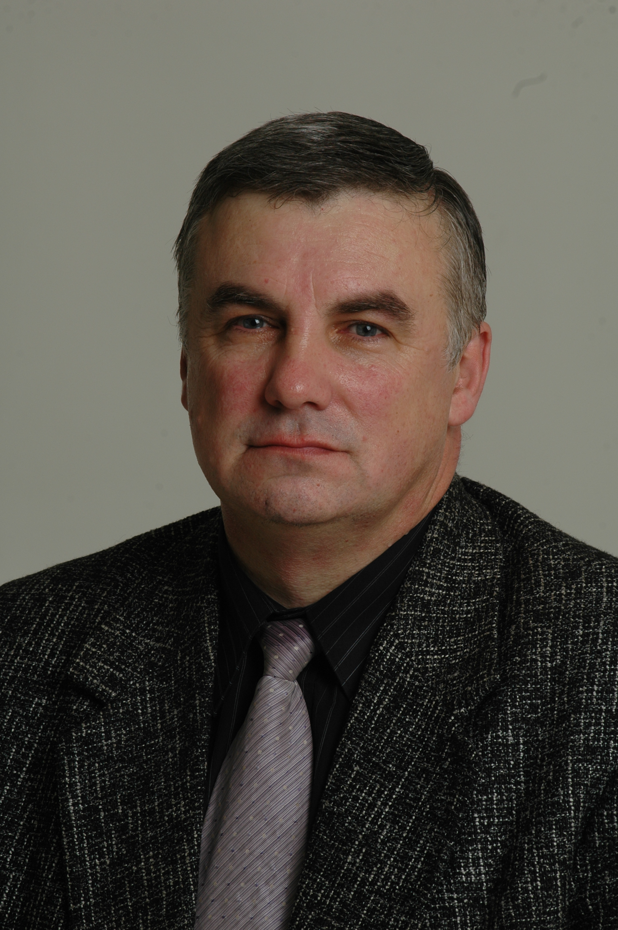 Foto: Saeima